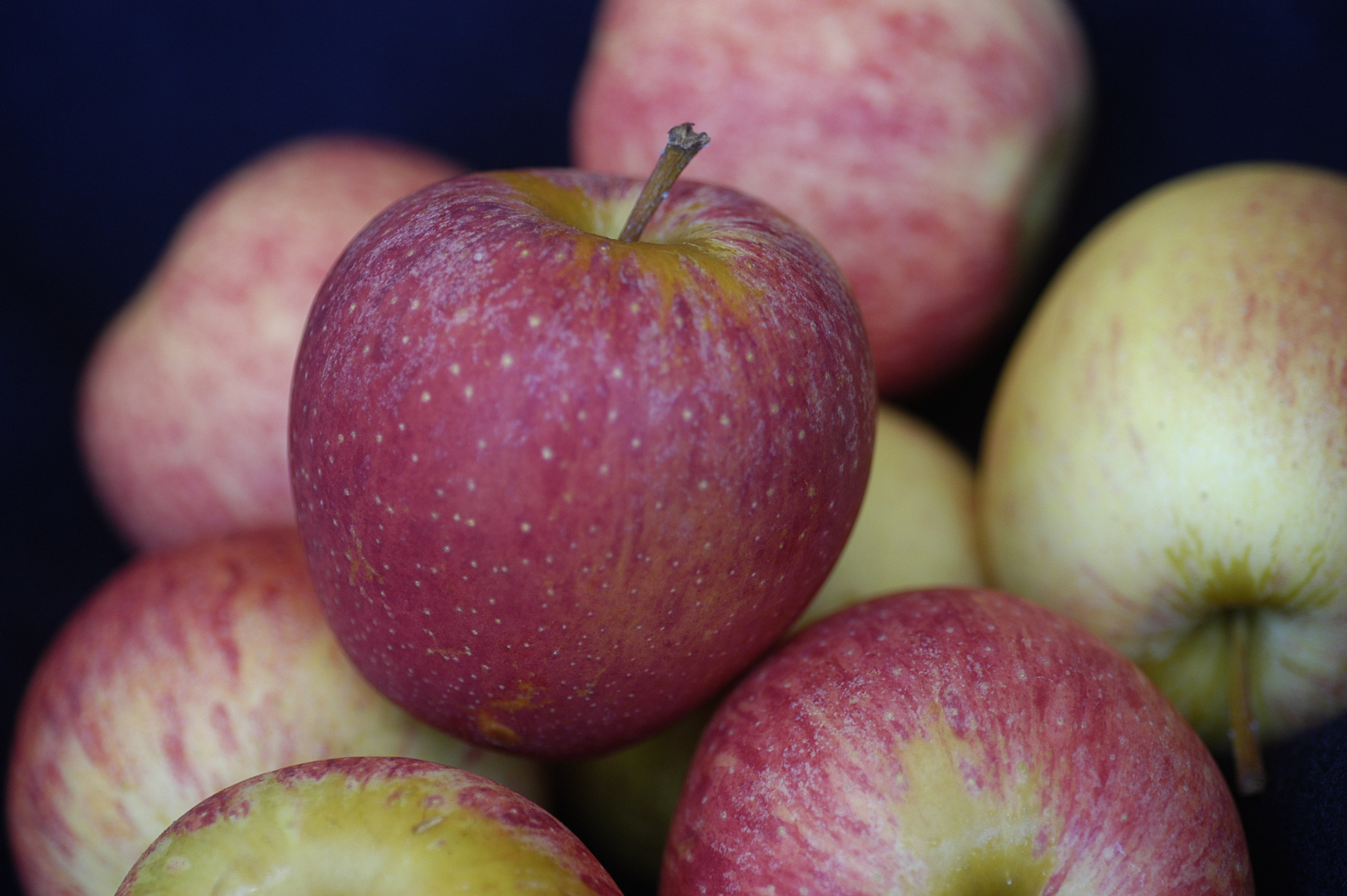 Malus domestica